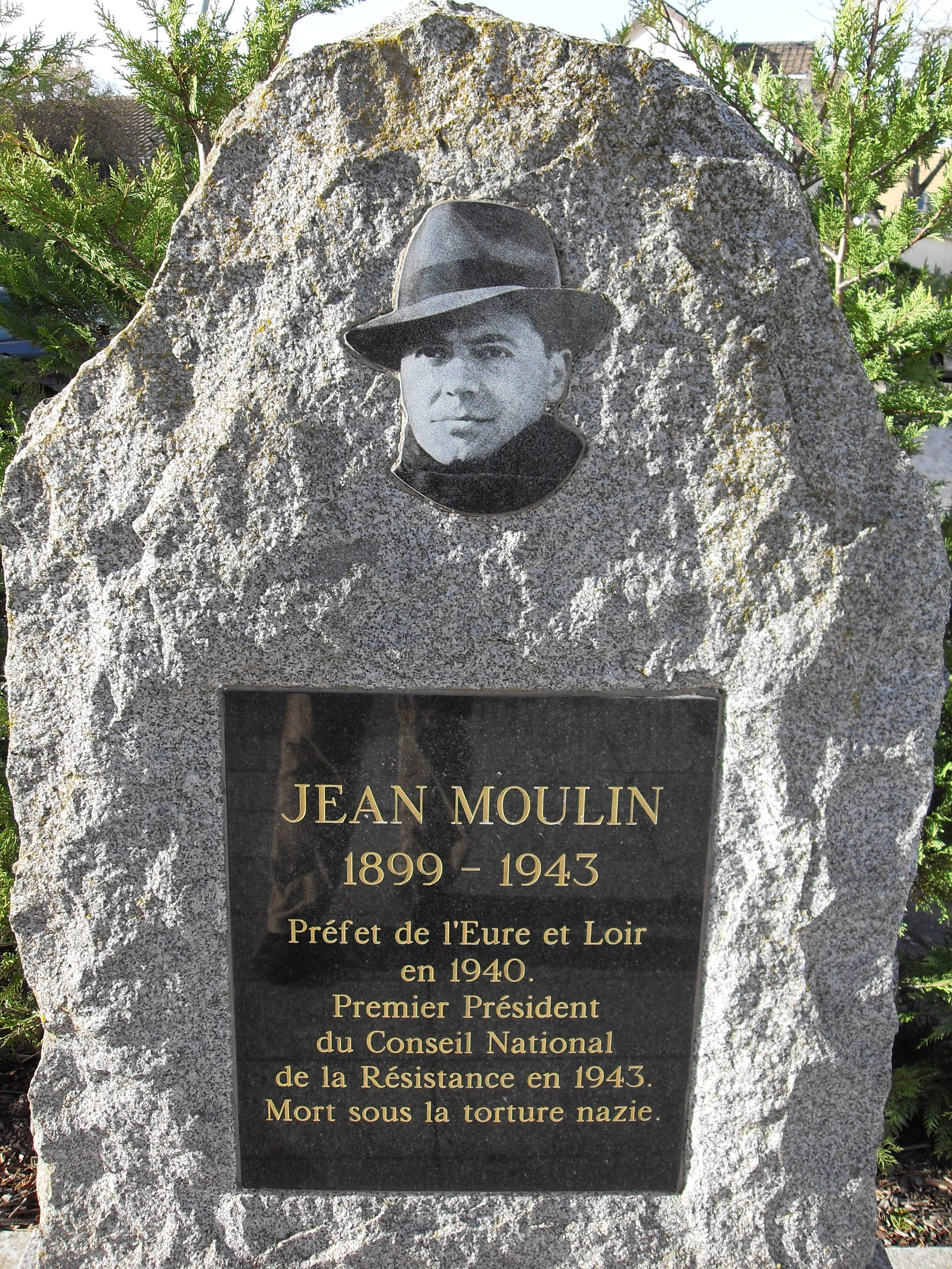 France, Les Clayes sous Bois, Yvelines (78) - Monument Jean Moulin devant le bureau de Poste, place de la République. Ce monument a disparu en 2016 lors de travaux de réaménagement du parking